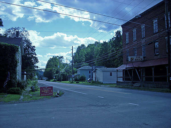 Burlington, Pennsylvania